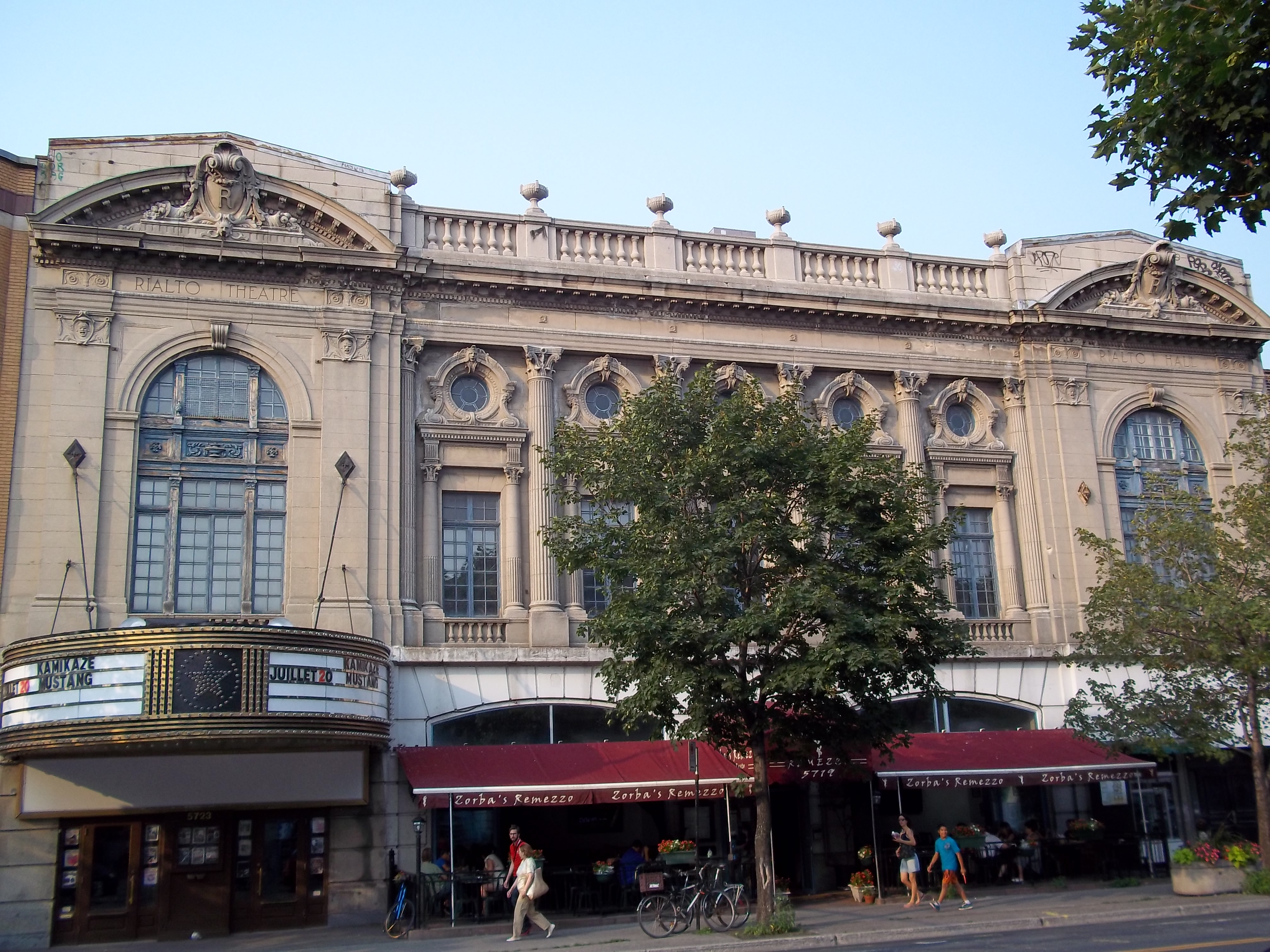 Cinéma Rialto, 5711 avenue du Parc, Montréal